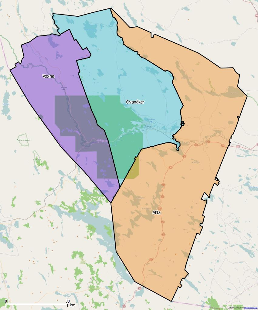 Distriktsindelningen i Ovanåkers kommun World file: 147.67025105717462452 0 0 -147.67025105717462452 1689116.80066670686937869 8774400.90661686845123768